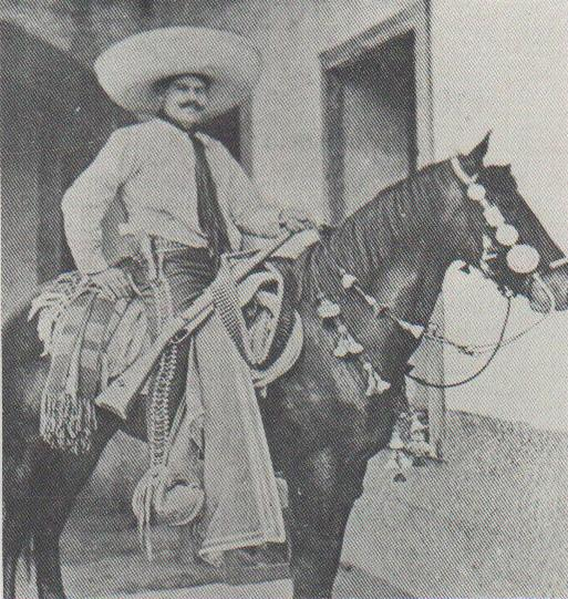 General Jesús Chávez Carrera